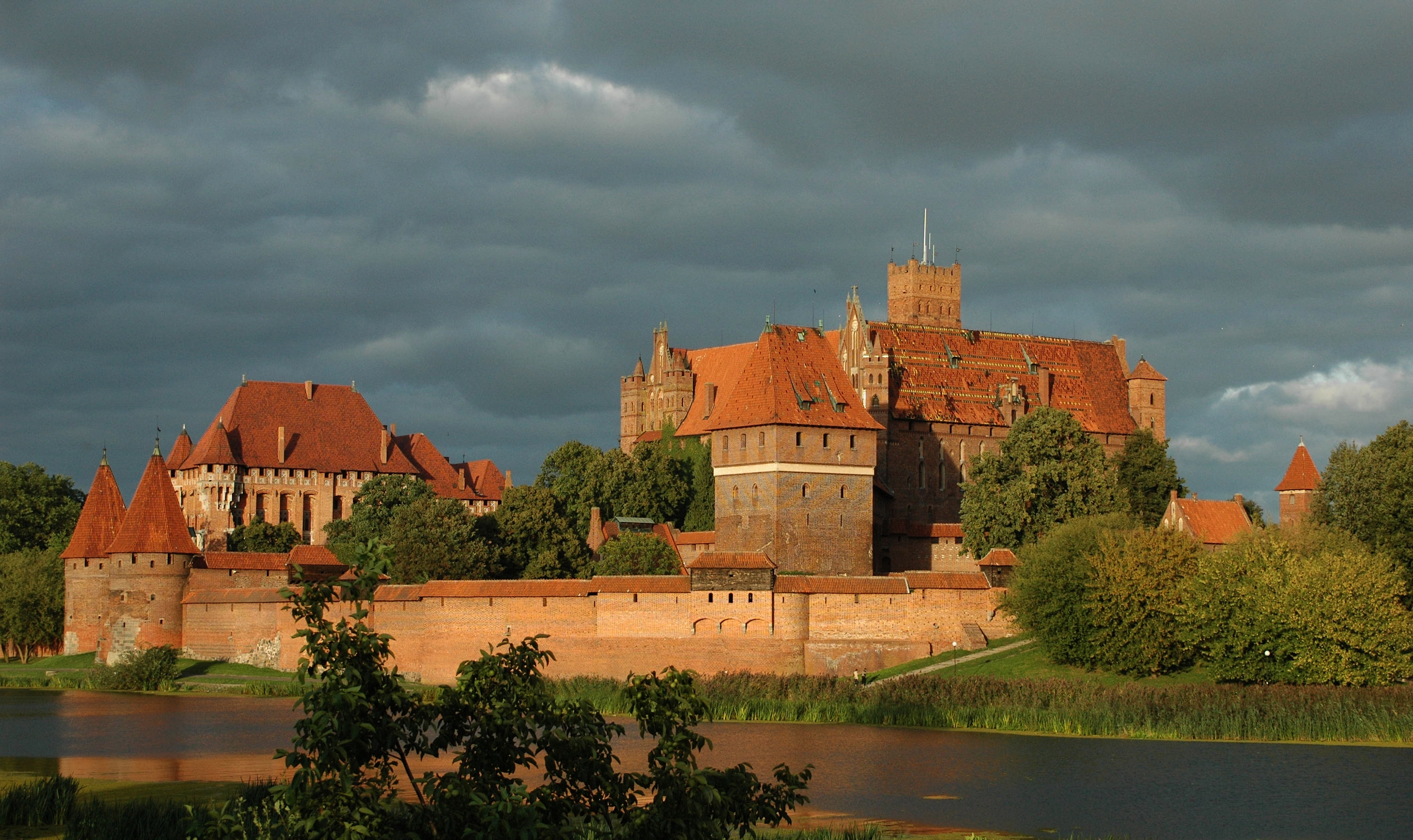 Zamek Krzyżacki w Malborku, widok od strony rzeki Nogat.